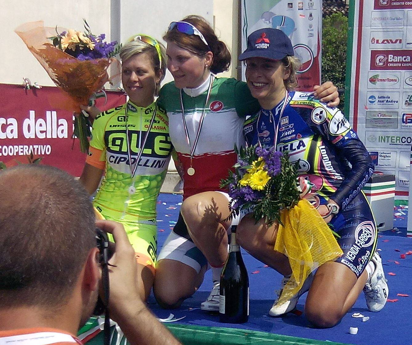 Elena Burlato (2nd), Elisa Longo Borghini (1st), Vittoria Bussi (3rd), Individual Time Trial, 2014 Italian National Championships